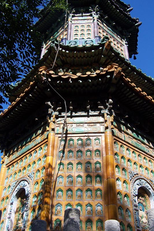 'Duobao Glazed Pagoda — 花承阁琉璃塔, Summer Palace, Beijing.